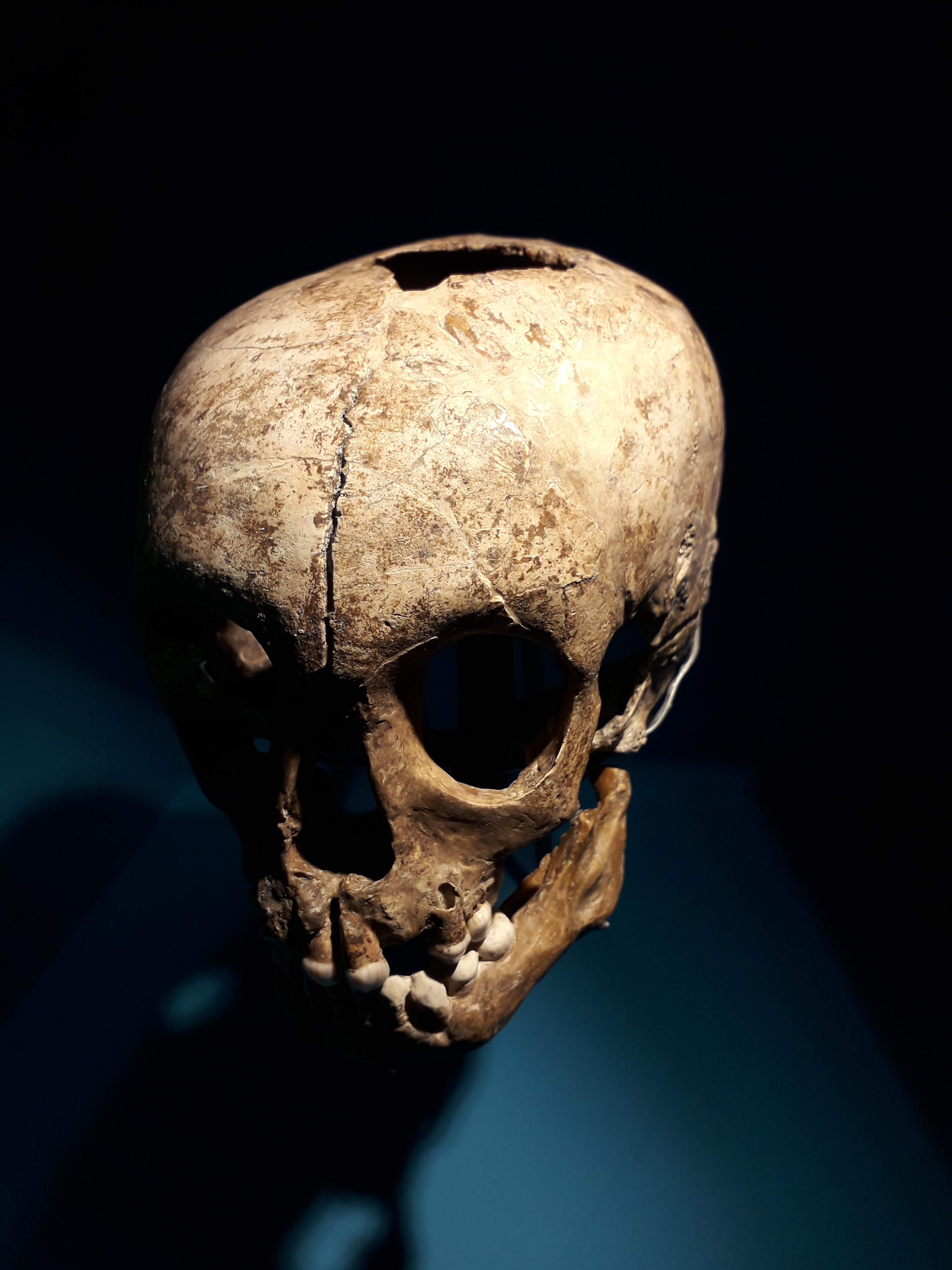 Crâne et mandibule de l'enfant du Pech-de-l'Azé. Os fossiles. Site du "Pech-de-l'Azé" (Dordogne), France. Date : entre -45 000 et -40 000. Collections du Muséum national d'histoire naturelle de Paris. Photographié à l'exposition "Néandertal, l'expo" au musée de l'Homme à Paris en avril 2018.